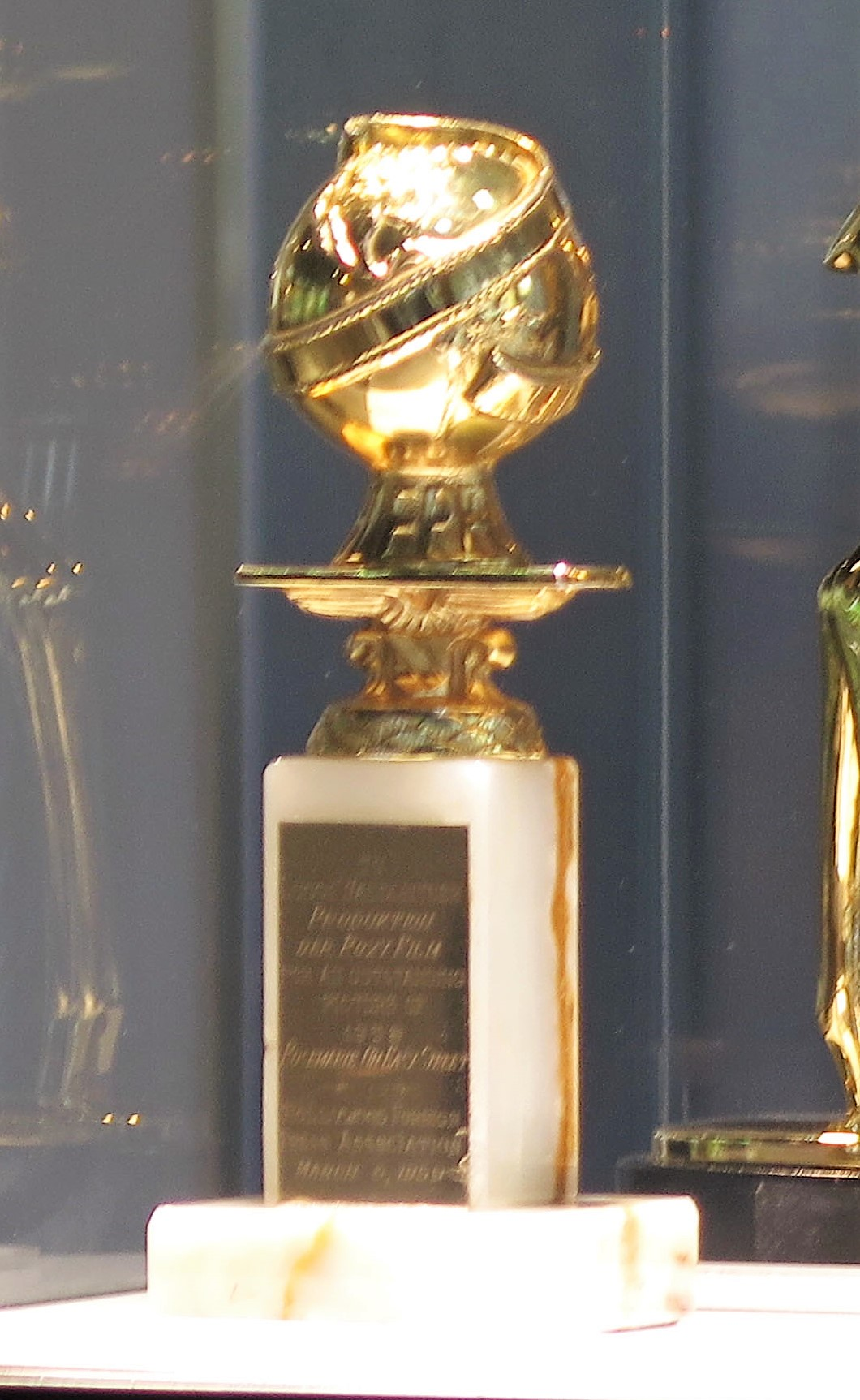 Un Globo de Oro.